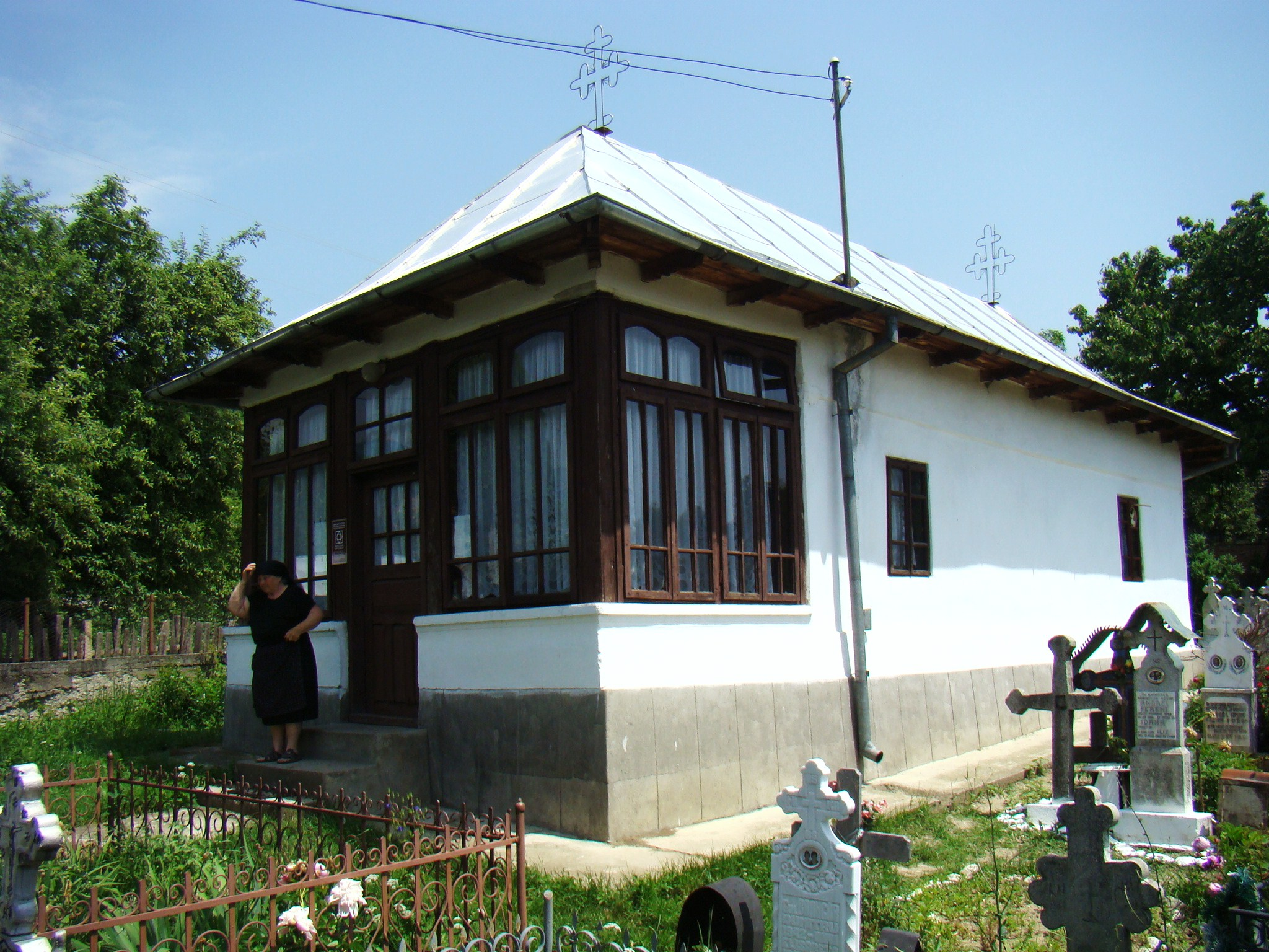 Biserica Sf Nicolae Barbatesti (Poeni), Valcea. Vedere de ansamblu